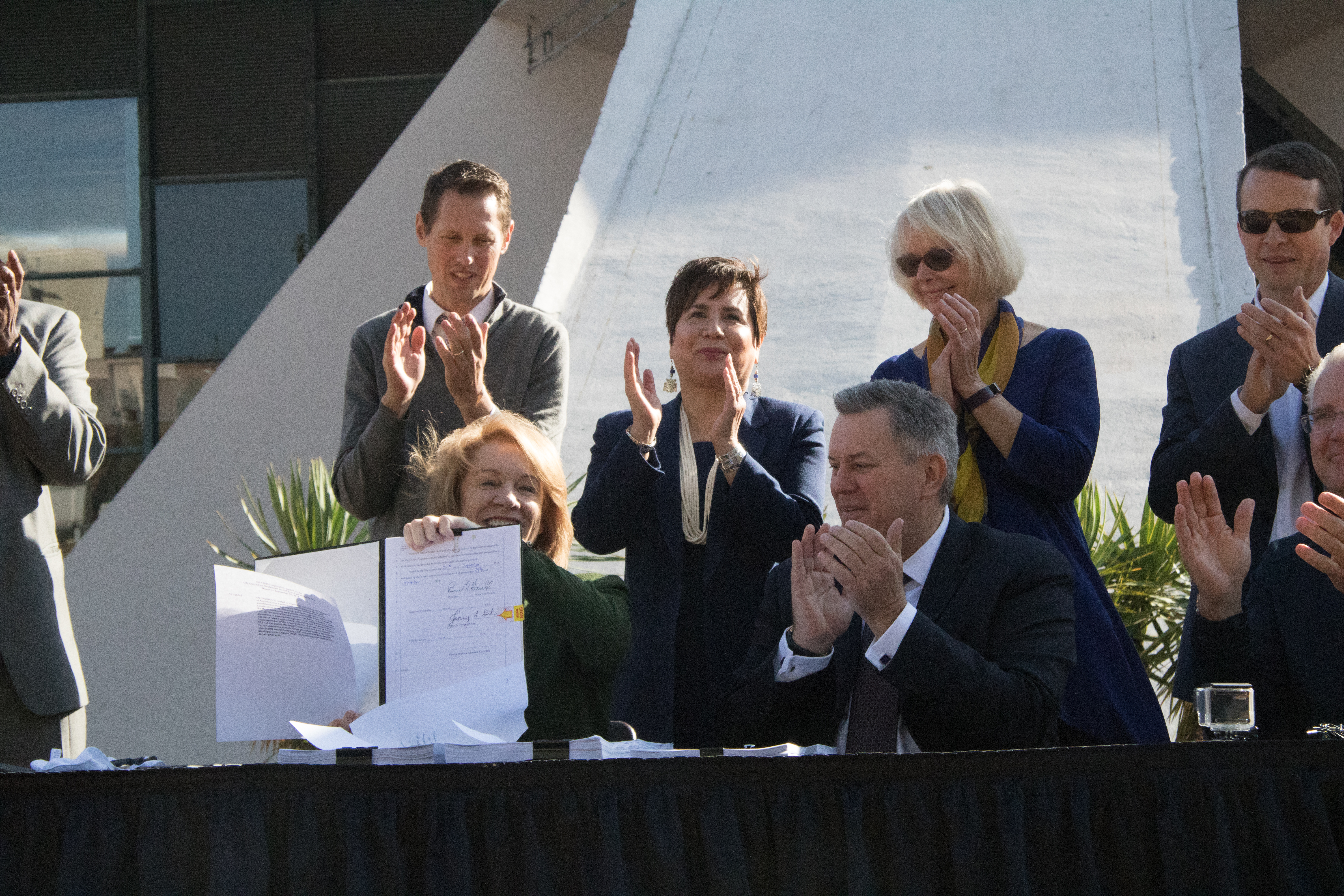 Key-Arena-Bill-Signing-21